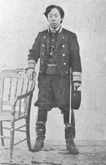 松平定敬（1847-1908）